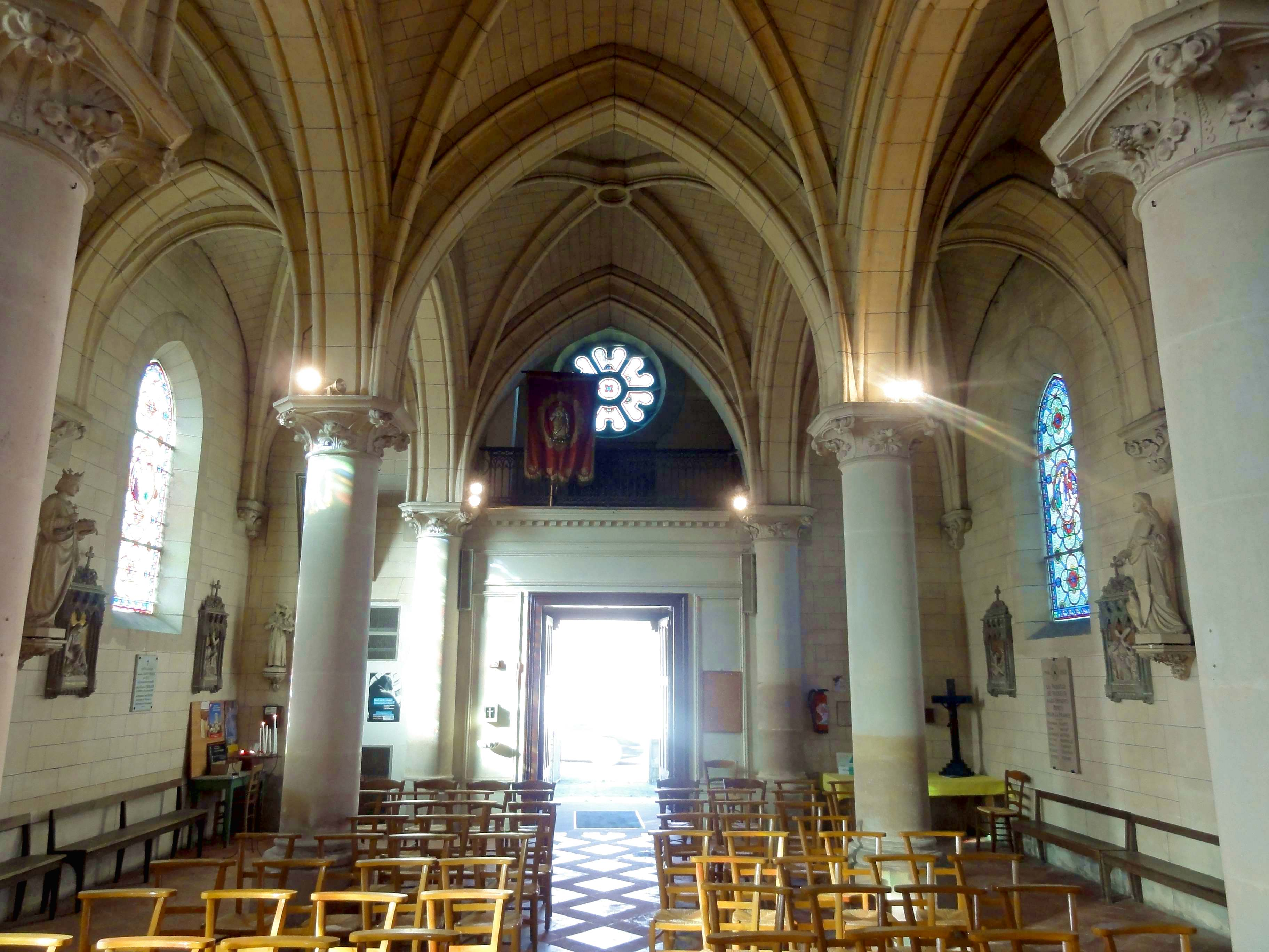 Intérieur de l'église - voir titre.